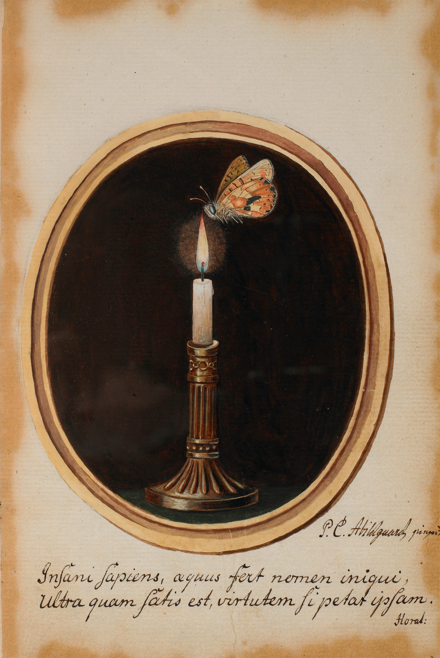 Akvarel af P.C. Abildgaard i Johan Bülows kunstbog fra 1778 For Kunstnere og Kunstelskere - En natsværmer der er lidt for emsig i sin fremfærd. Tolkes som en hentydning til Bülows uforsigtige optræden over for kronprinsen, den senere Frederik 6. Jævnfør Anne Christiansen i udstillingsbogen Sanderumgaards Romantiske Have, 2010, side 31 - (Om udstillingsbogen) (Om "Kunstbogen")